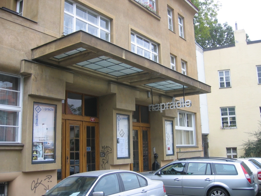 Fotografie Divadla Na Prádle, autor L. V.